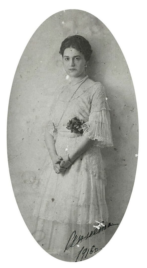 Анна Ильинична Чавчавадзе (1891—1943), была замужем за князем Александром Илларионовичем Воронцовым-Дашковым (1881—1938).